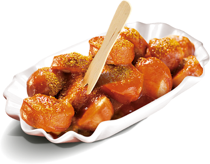 Curry wurst allemand